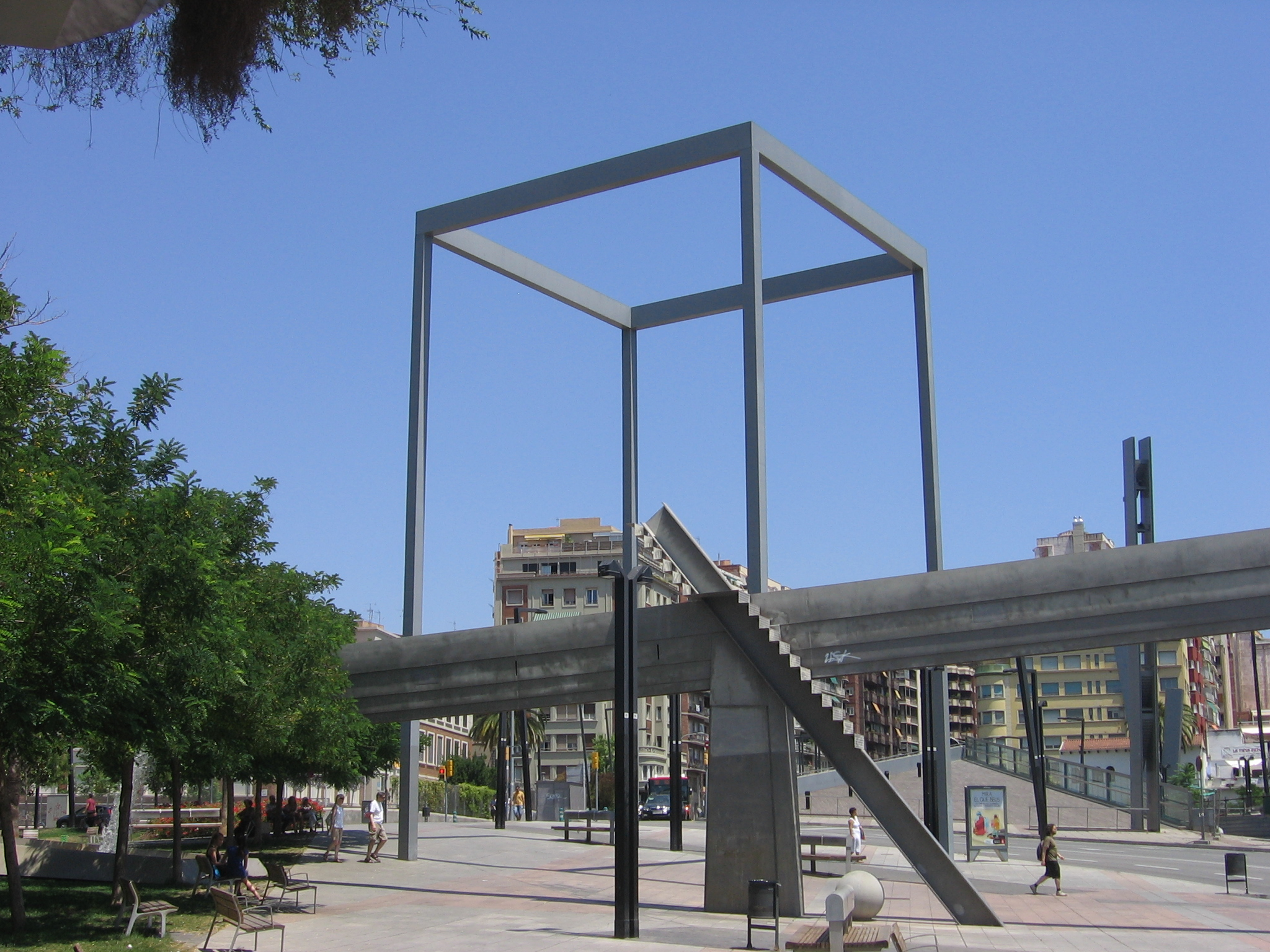 El Canal de Suez (2009), de Albert Viaplana, Plaza Lesseps.